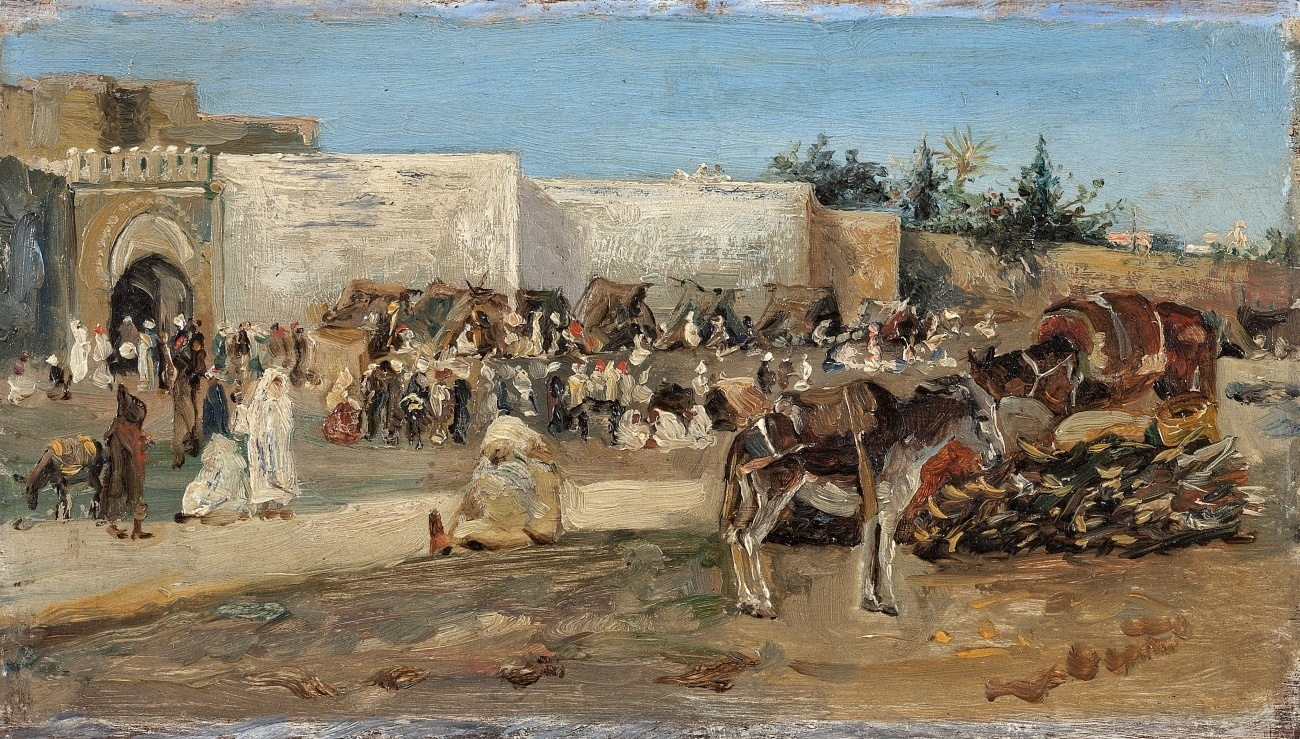 Tanger, El Zoco Grande. Verso bezeichnet: Gallegos 1879. Öl auf Holz. 10 x 17,5 cm.